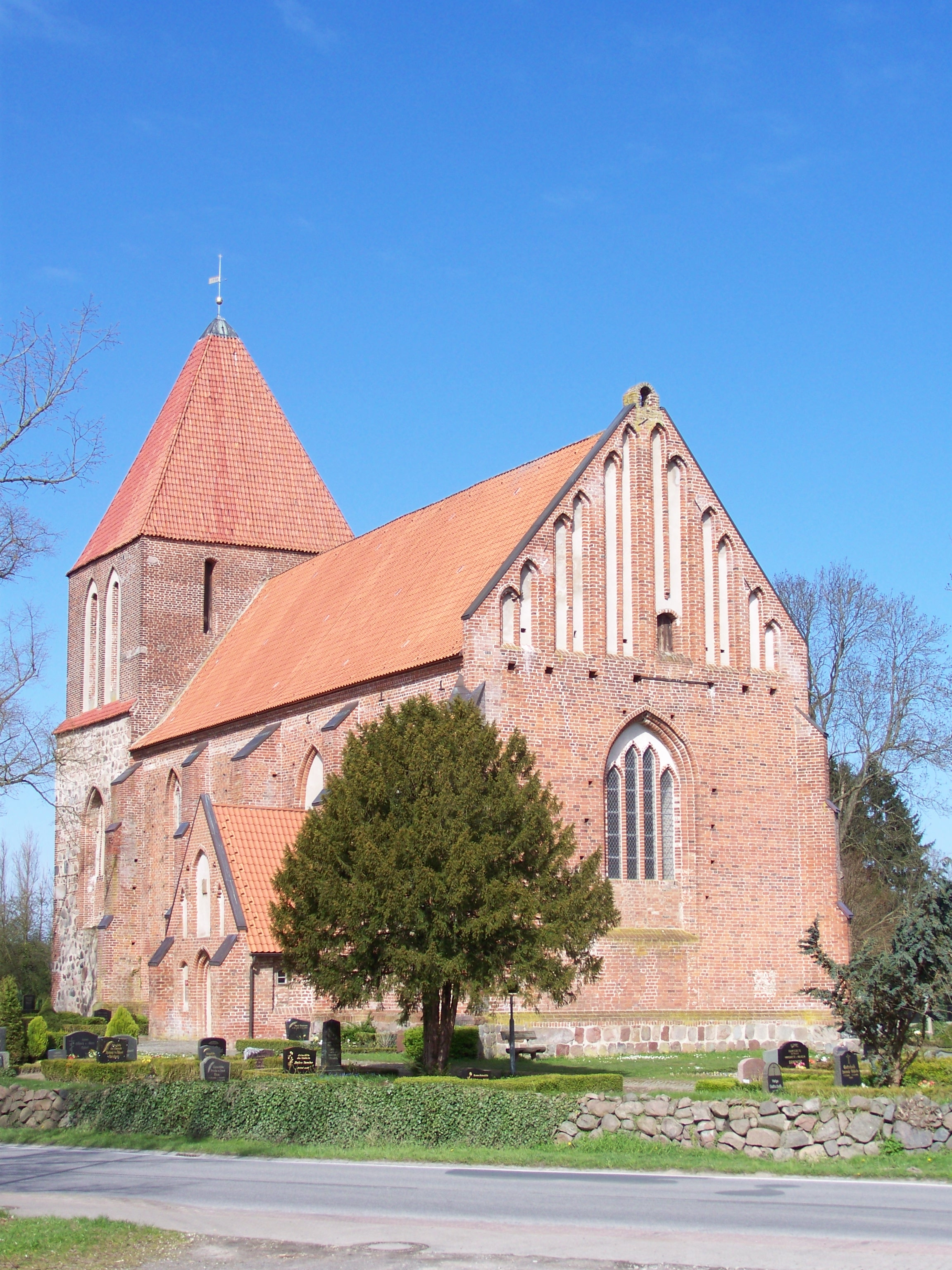 Steinhagen, Kirche - Ansicht von der Straße (2008-04-20)